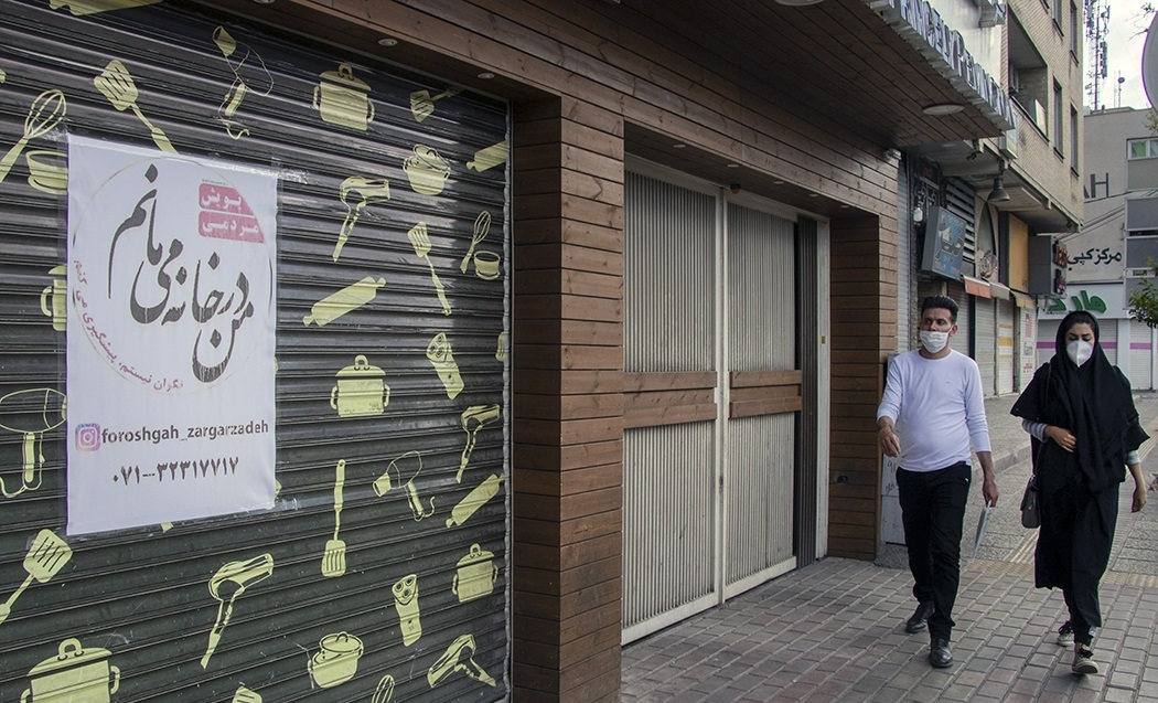 هشدارهای «کرونایی» در شهر